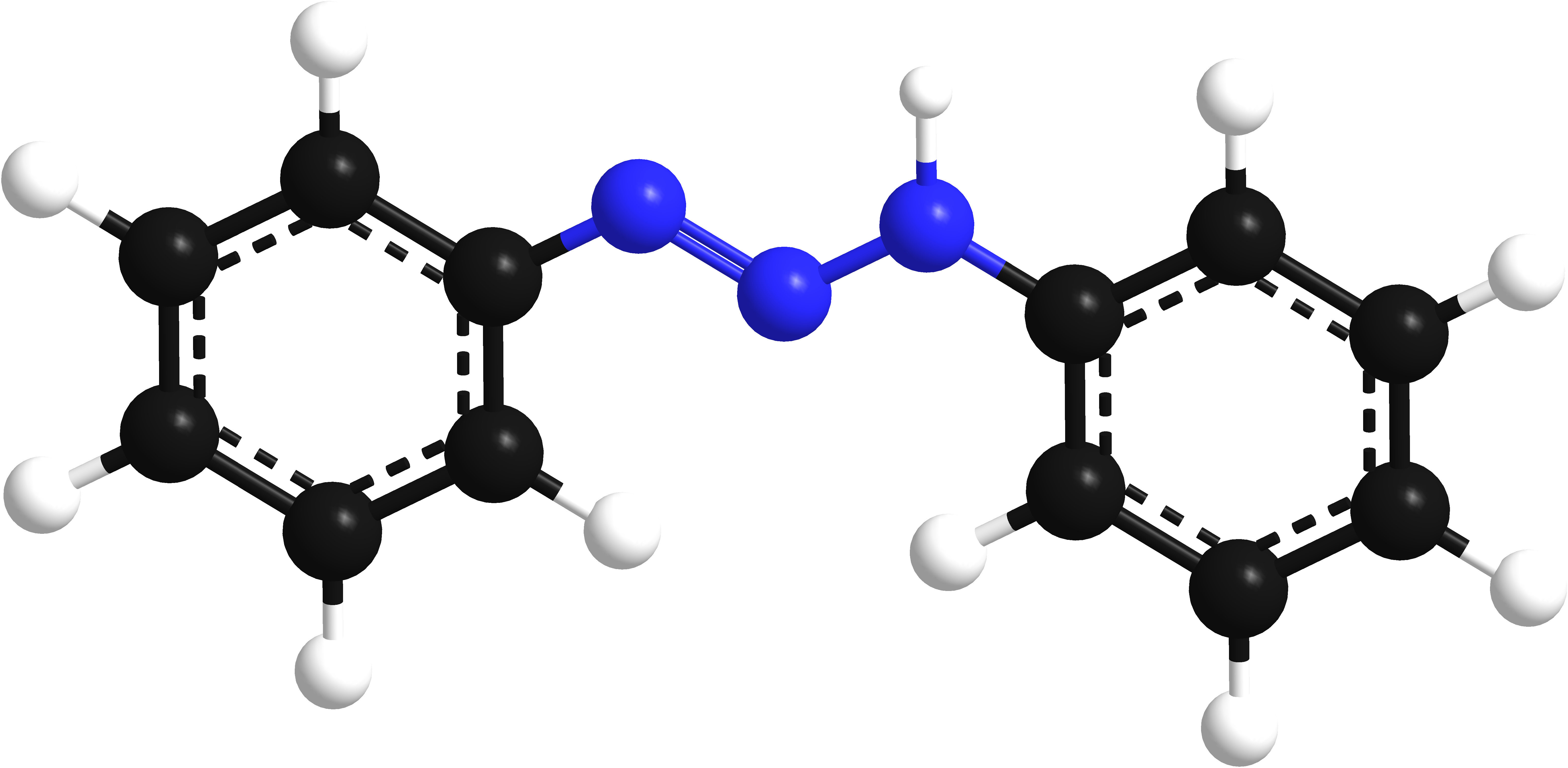 Model cząsteczki 1,3-diaminobenzenu.